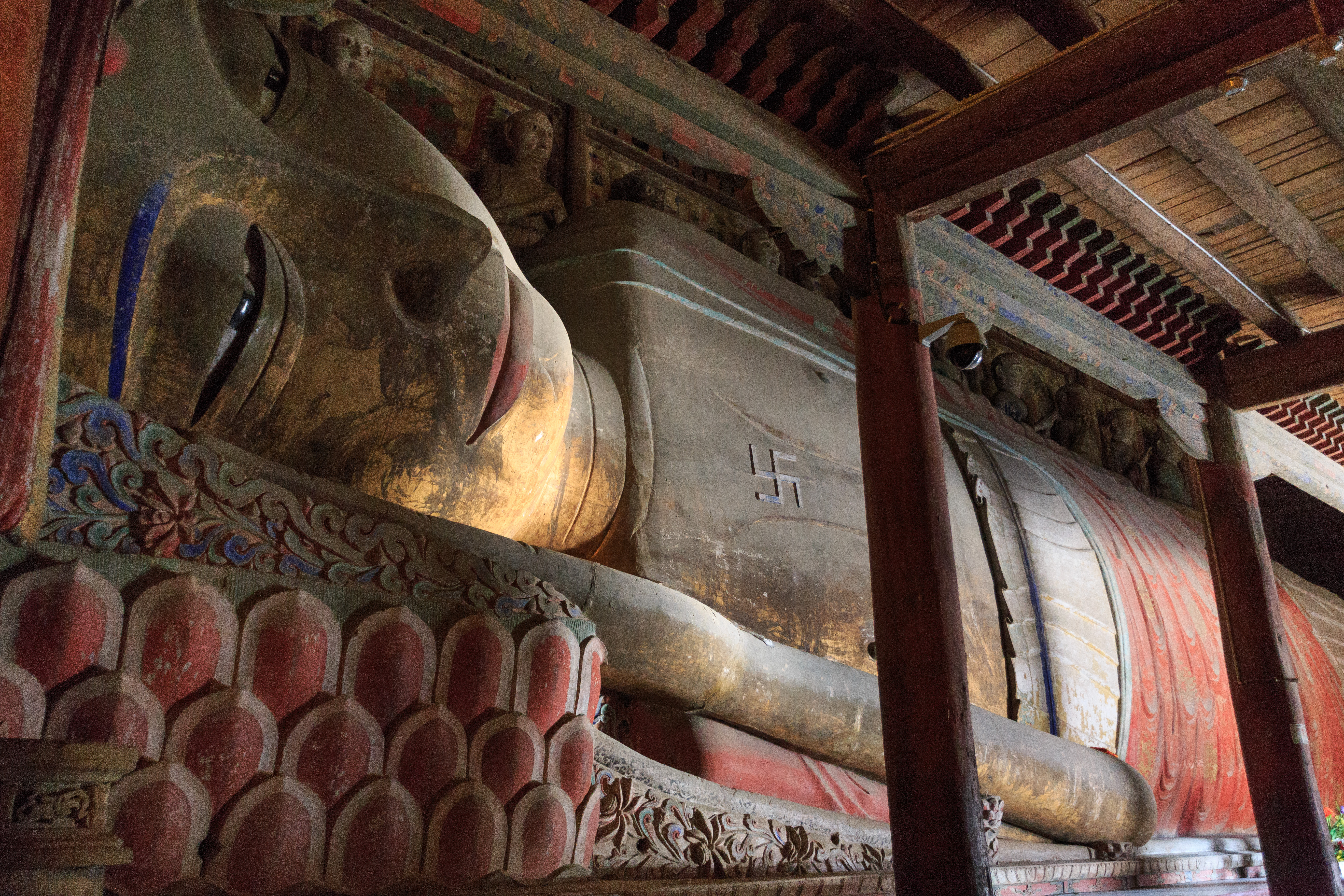 张掖大佛寺—— 大殿内的大佛